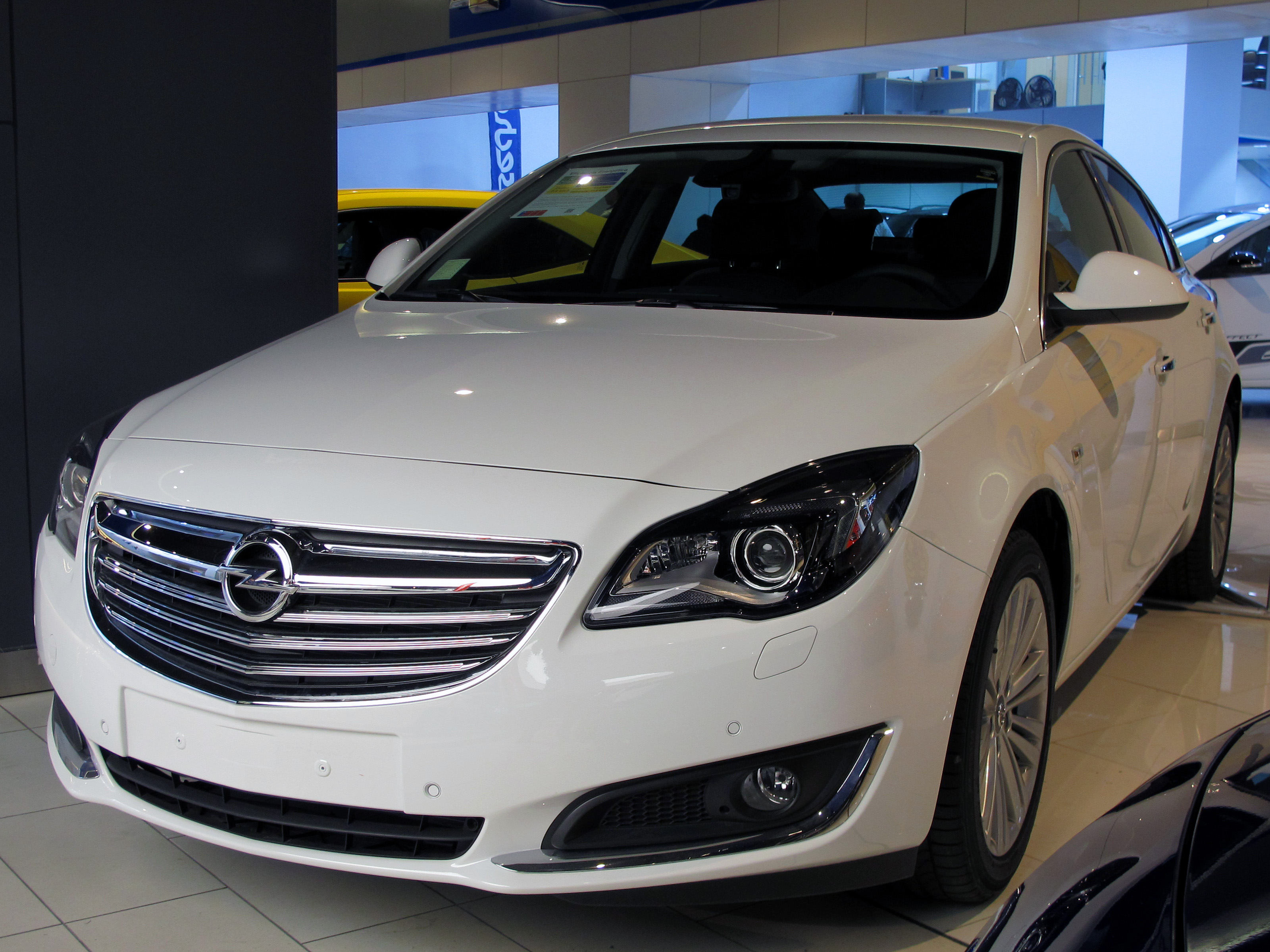 Opel Insignia 2.0T Cosmo 2015